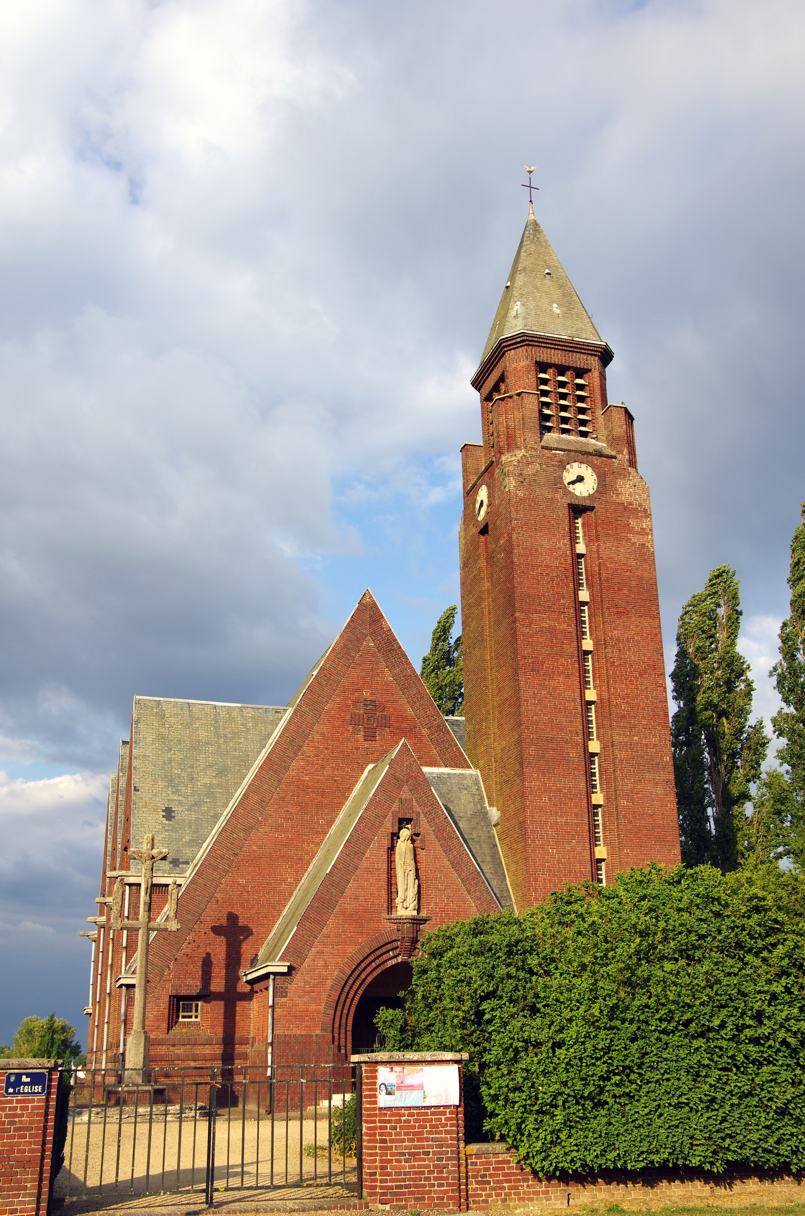 Beuvraignes (Somme, France) - L'église. L'ombre du calvaire dressé devant à gauche de l'édifice se projette sur la façade.